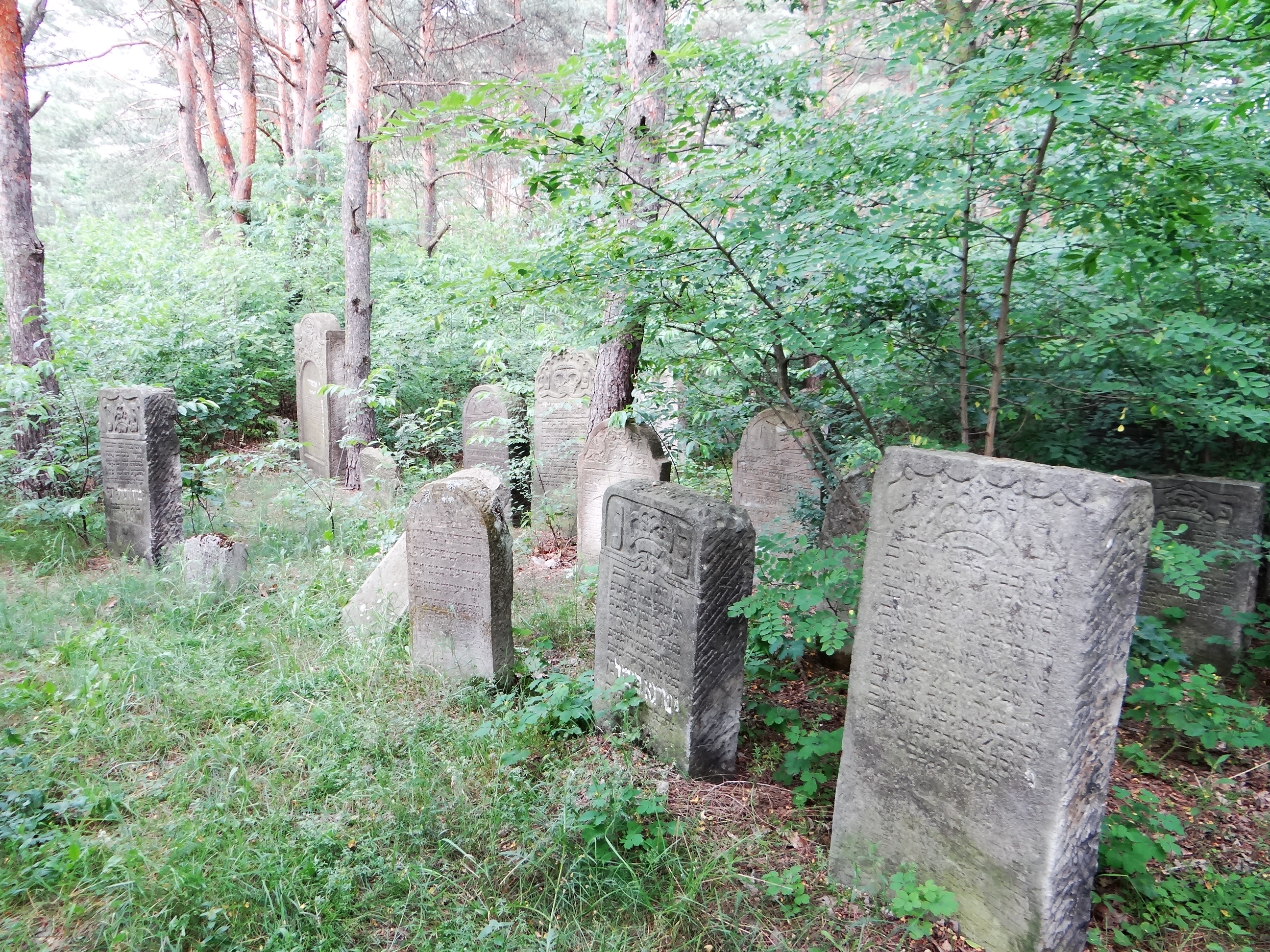 Zdjęcie wykonane na zabytkowym cmentarzu żydowskim w Ulanowie.